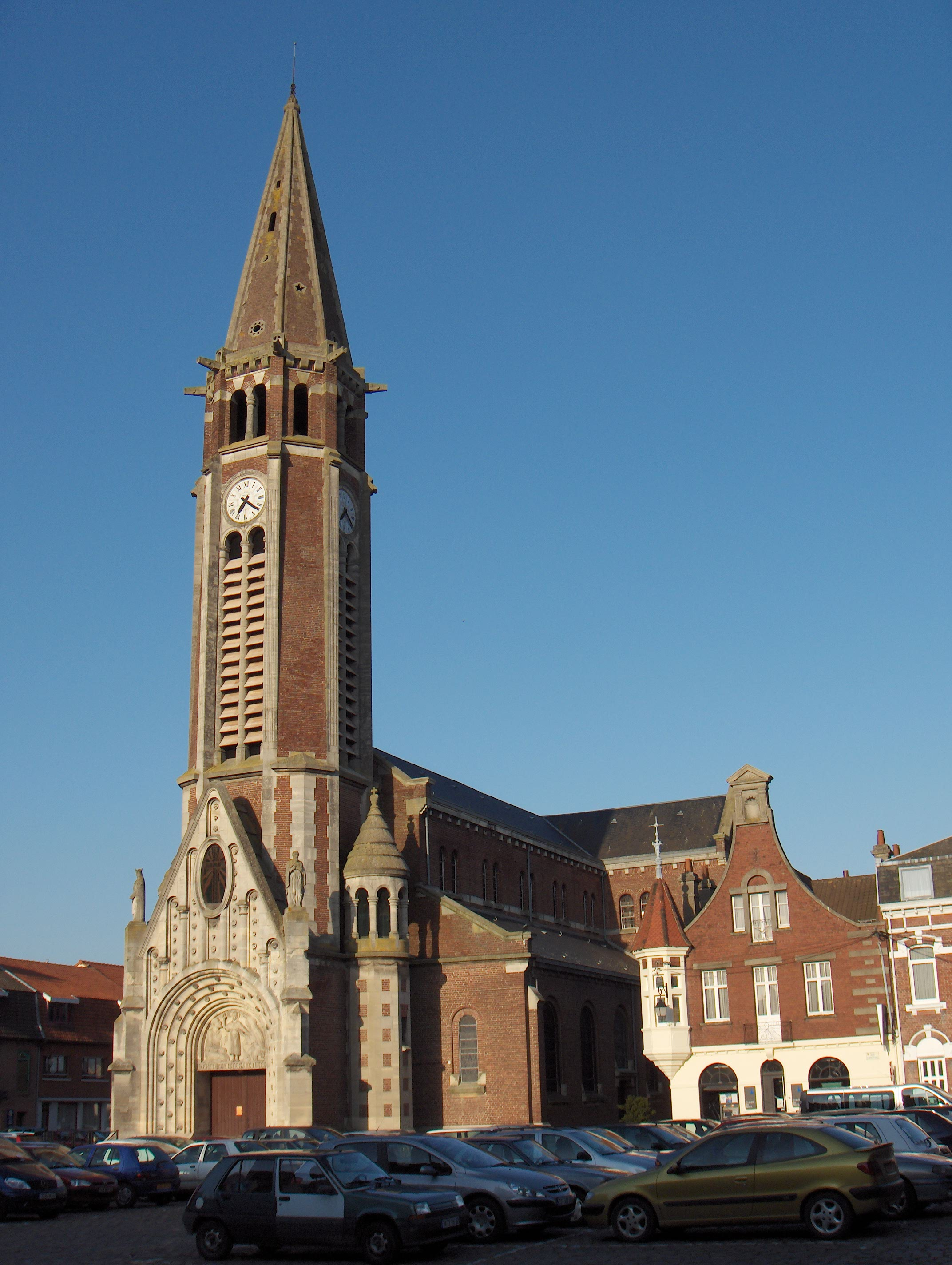 Saint-Venant (Frankreich, Dept. Pas-de-Calais), Sankt Venantiuskirche (église Saint-Venant), neu errichtet nach dem 1. Weltkrieg.